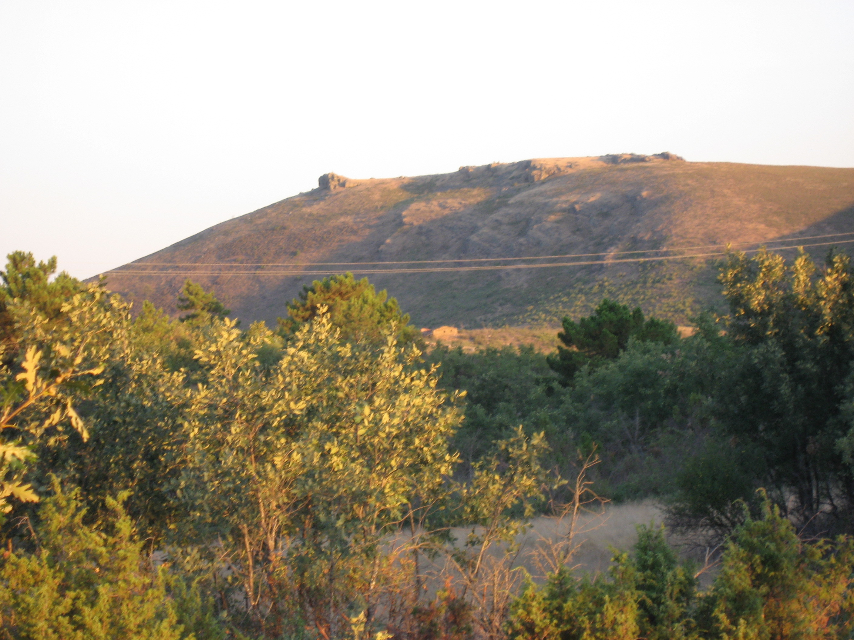 El Cerro Otero (Pico Rata), de 1321 metros de altitud, lugar más alto del municipio de Anguita.